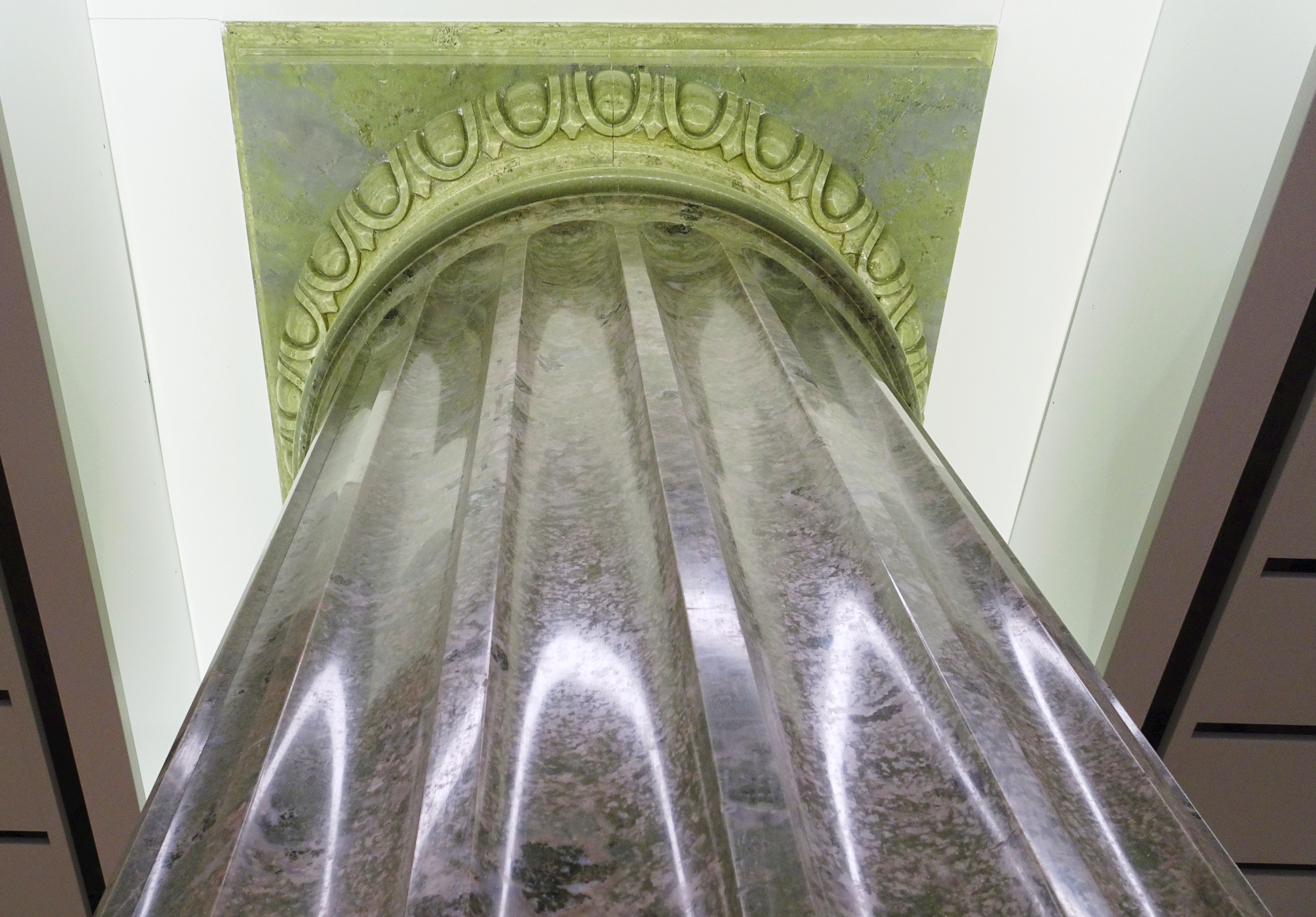 Grev Turegatan 3-5, Bentley, före detta Ostermans Marmorhallar, kolonn i kolmårdsmarmor